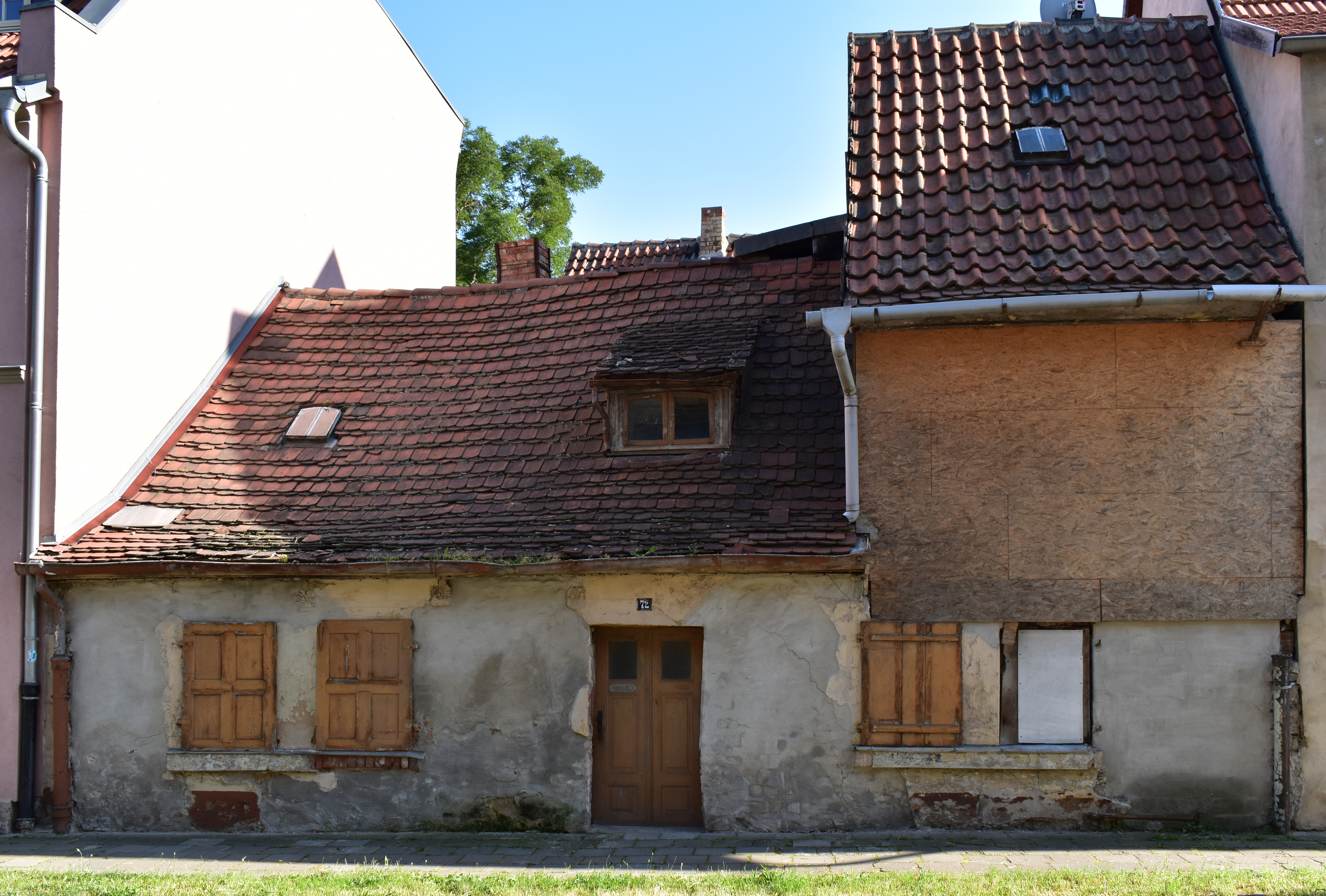 Gebäude Auf dem Graben 72 in Aschersleben